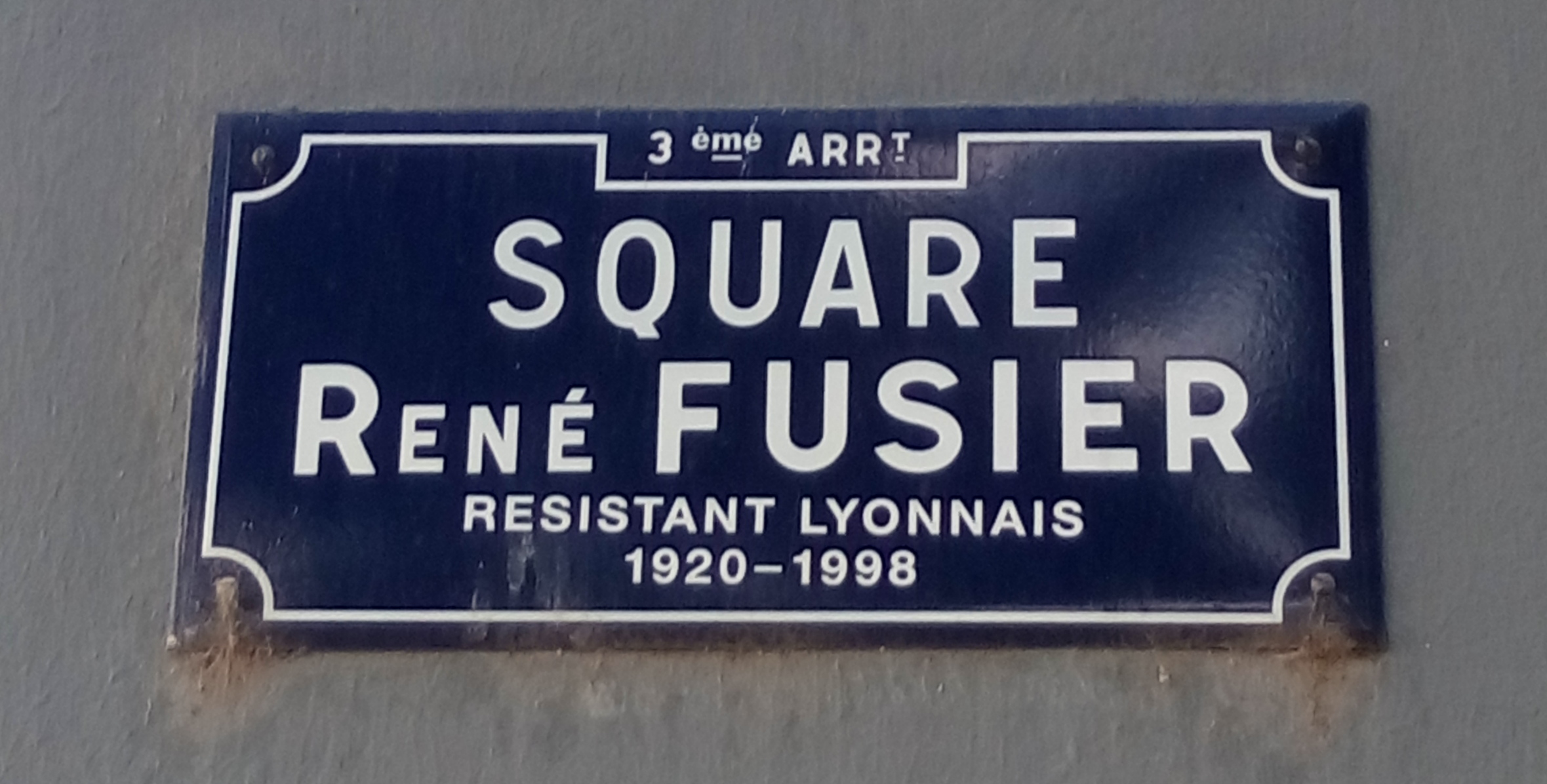 Plaque du square René-Fusier, dans le 3e arrondissement de Lyon.